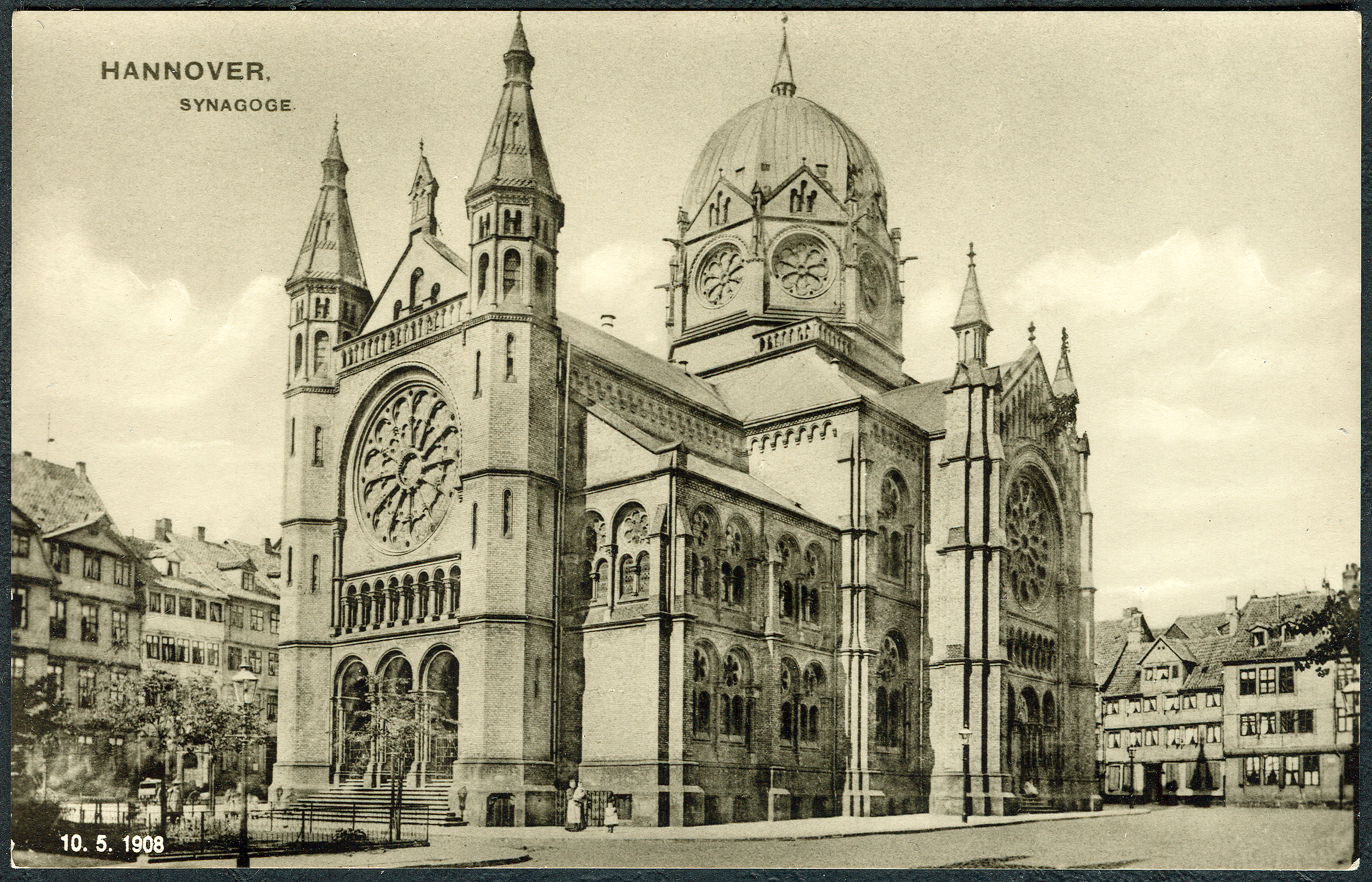 Bildseite der Ansichtskarte eines so - noch - nicht identifizierbaren Fotografen. Das Bild, ergänzt um die Angabe „10. 5. 1908“ (gemeint ist das Datum des ehemals auf dem Revers des Originals aufgestempelten Poststempels) mit einem Blick um 1900 auf die seinerzeitige Neue Synagoge in Hannover ...